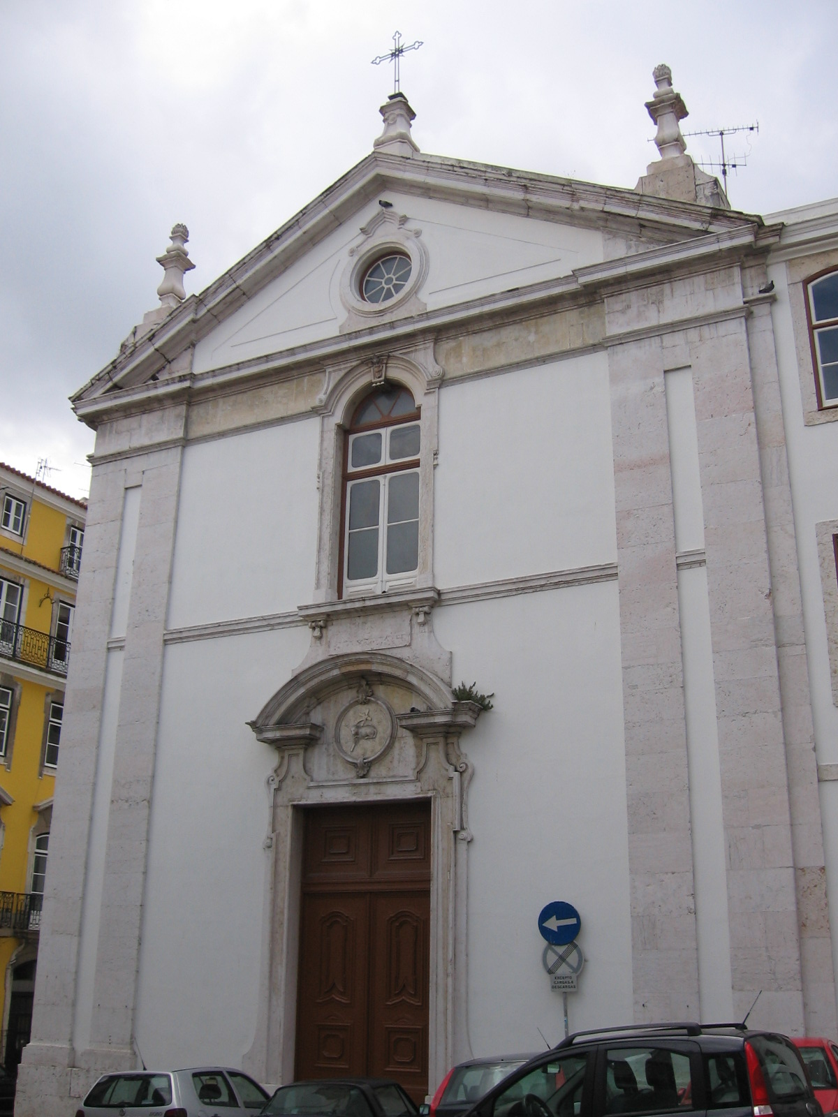 Igreja de São João da Praça, freguesia da Sé em Lisboa, Portugal